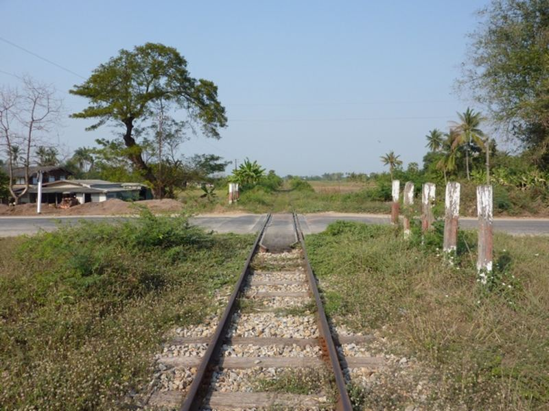 จุดตัดถนนเลียบคลองชลประทาน ทางรถไฟสายสุพรรณบุรี